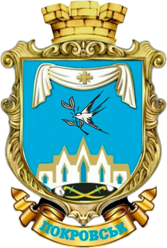 Герб Покровська